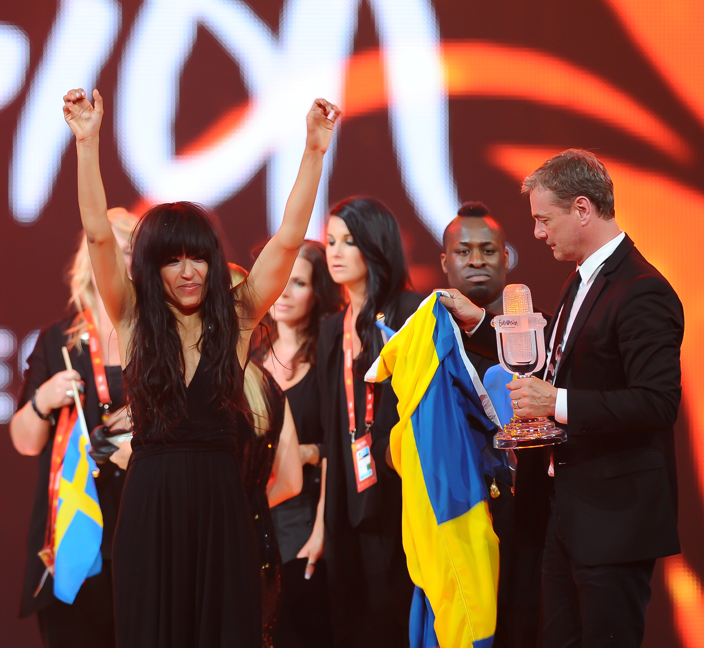 Победительница Евровидения 2012